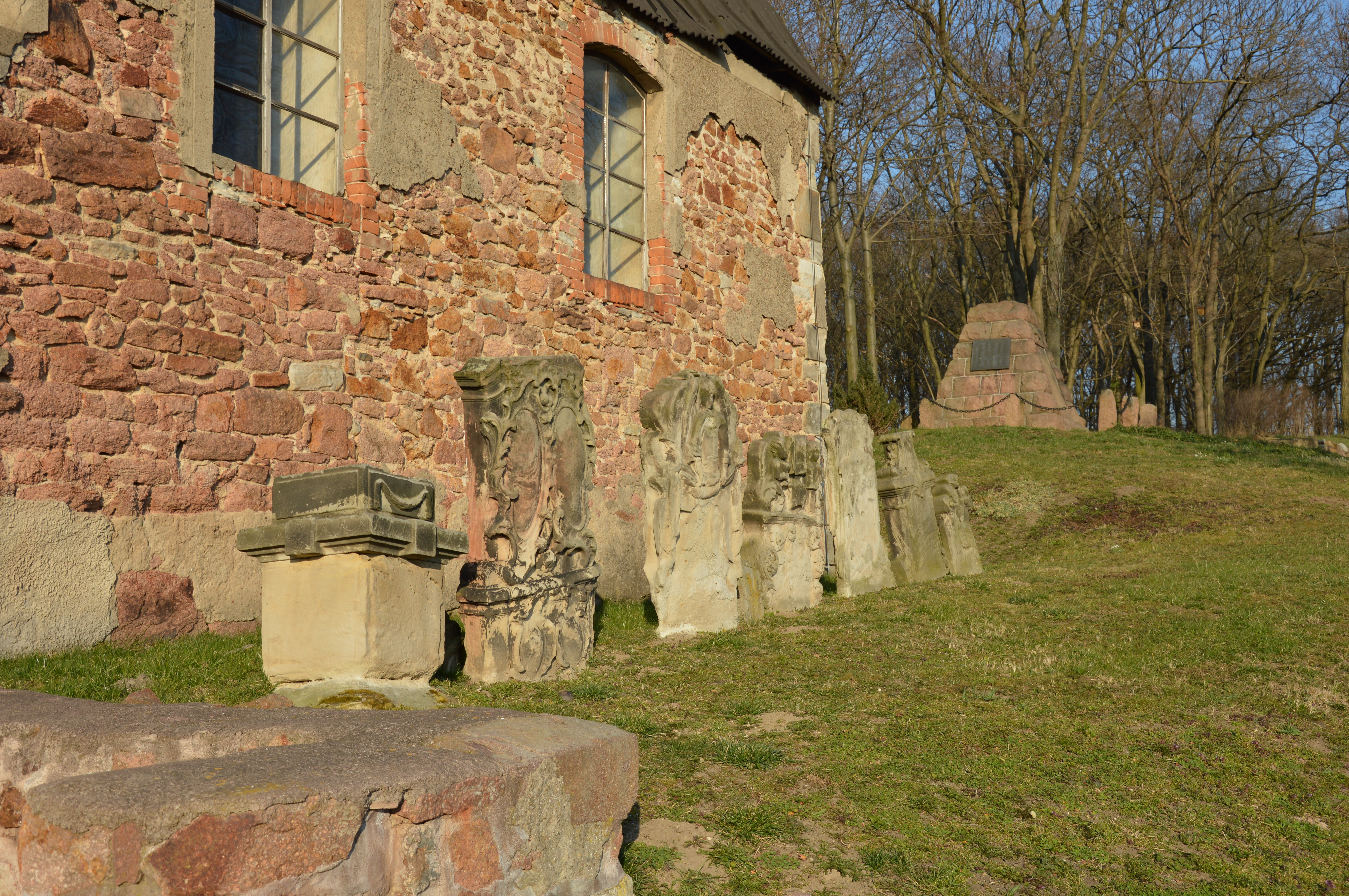 Grabsteine in Morl